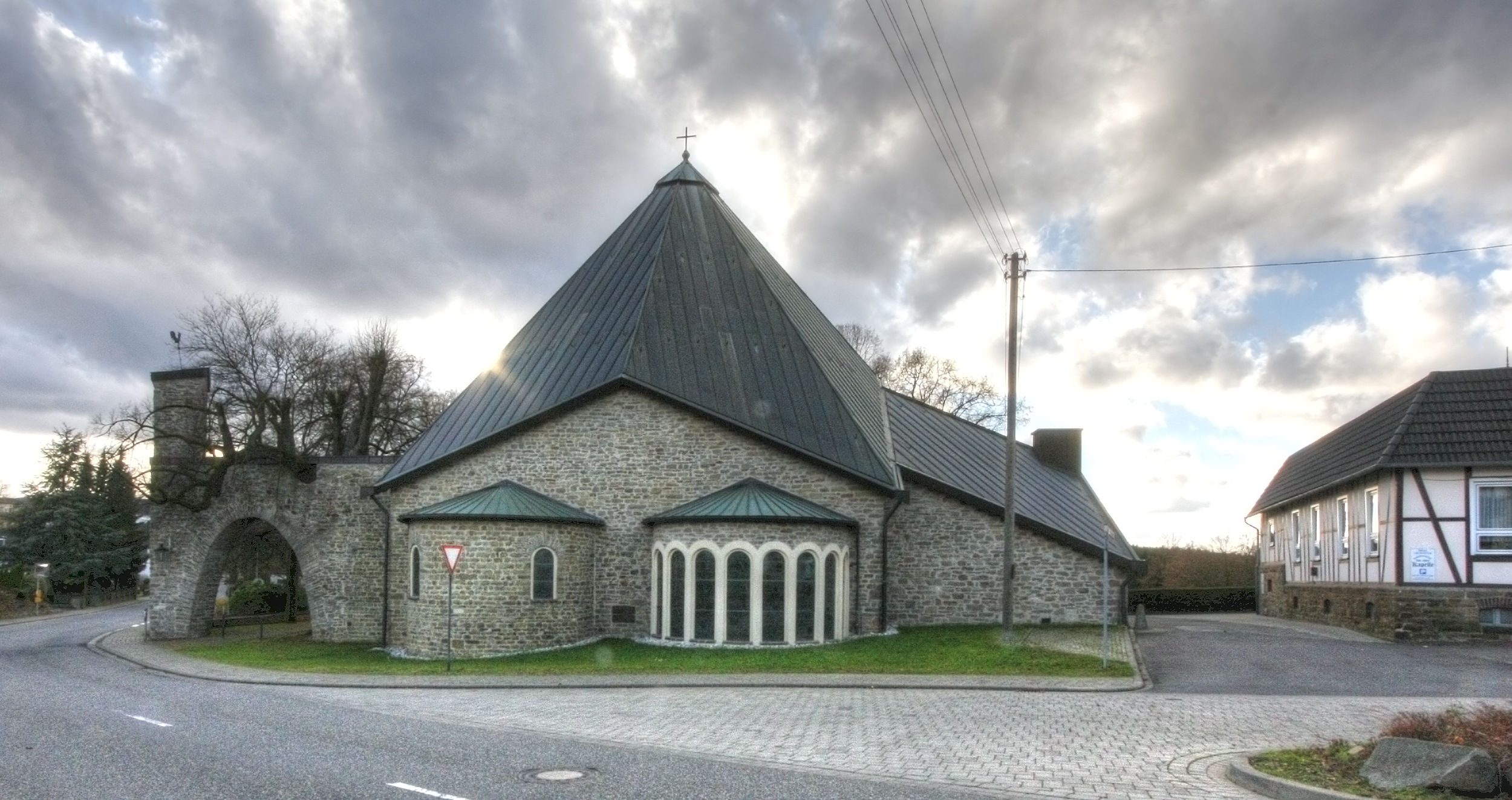 St.-Elisabeth-Kirche in Birken-Honigsessen (Westerwald), Architekt: Dominikus Böhm.